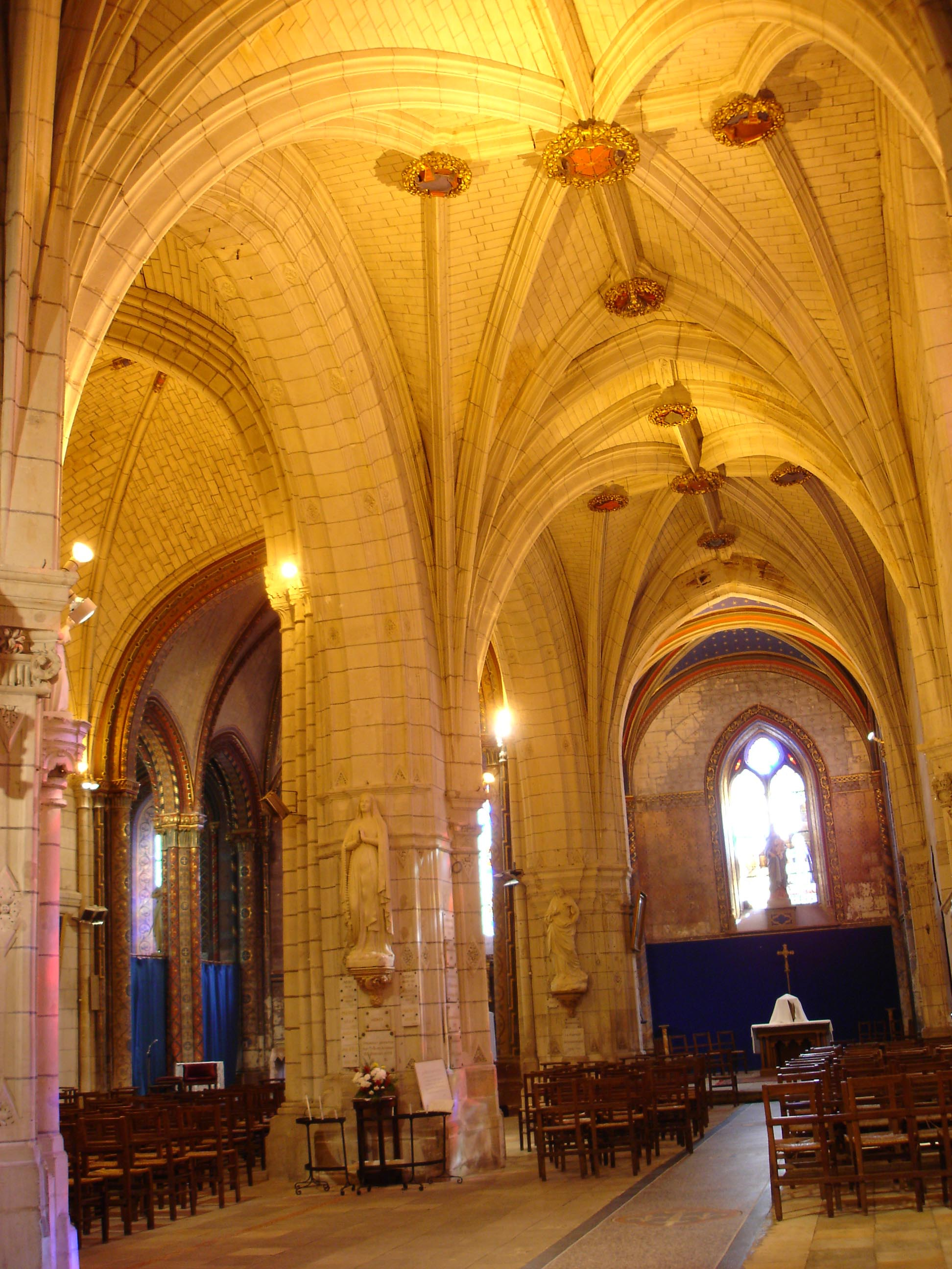 Eglise Saint-Maurice - série de chapelle formant bas-côté sud